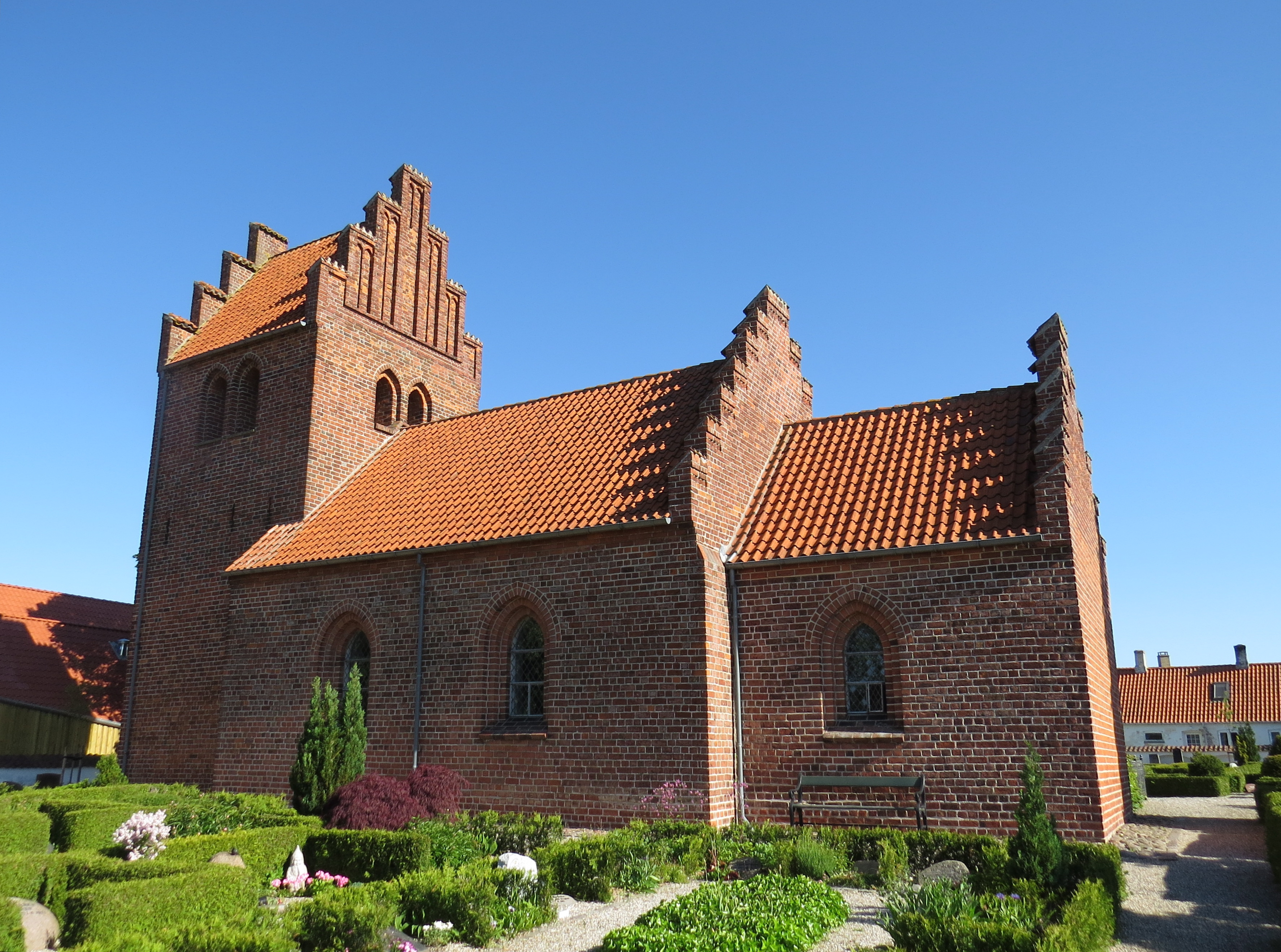 Ganløse Kirke, Ganløse, Sjælland